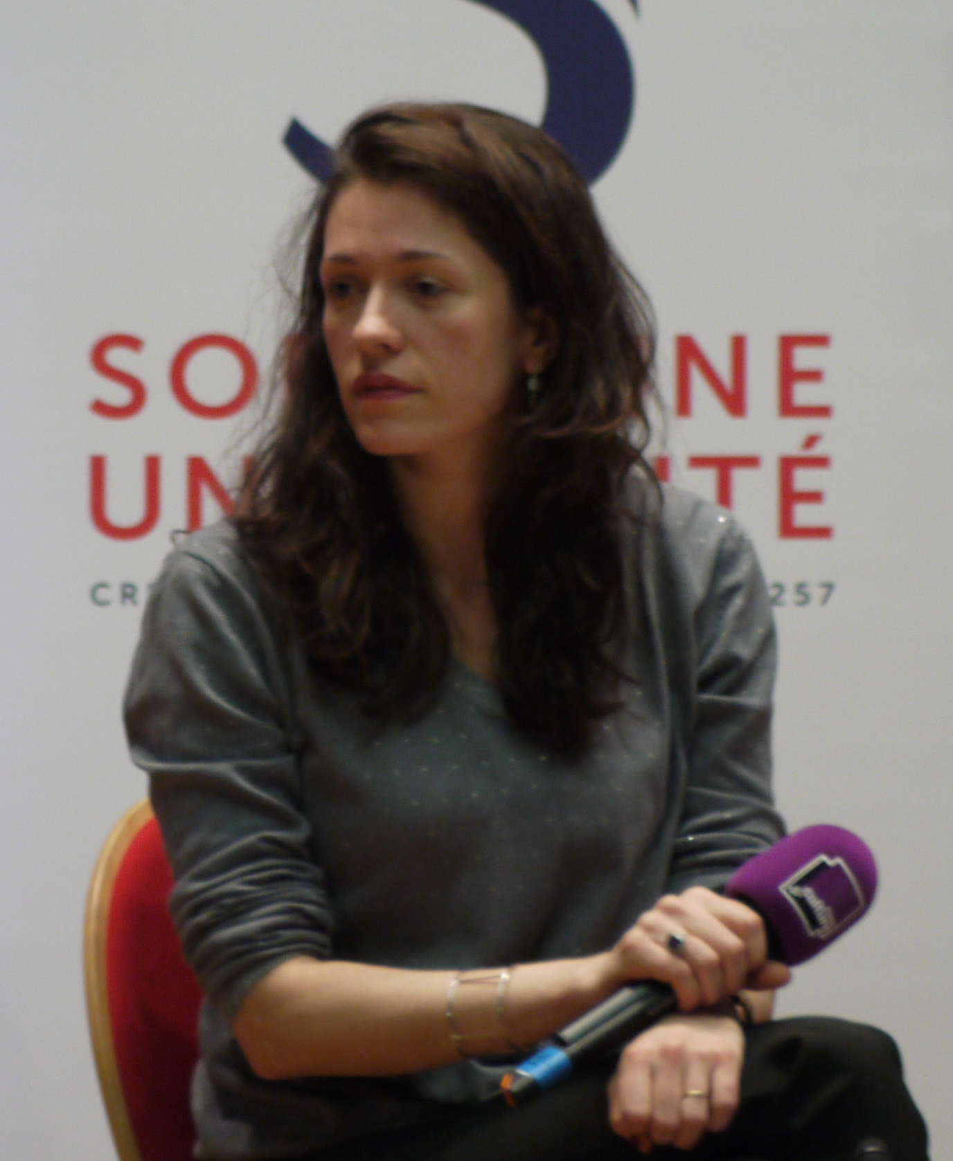 Maylis Besserie lors du forum « Animal ? » organisé par France Culture le 13 janvier 2018